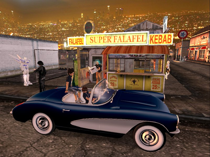 Second Life Vehicles